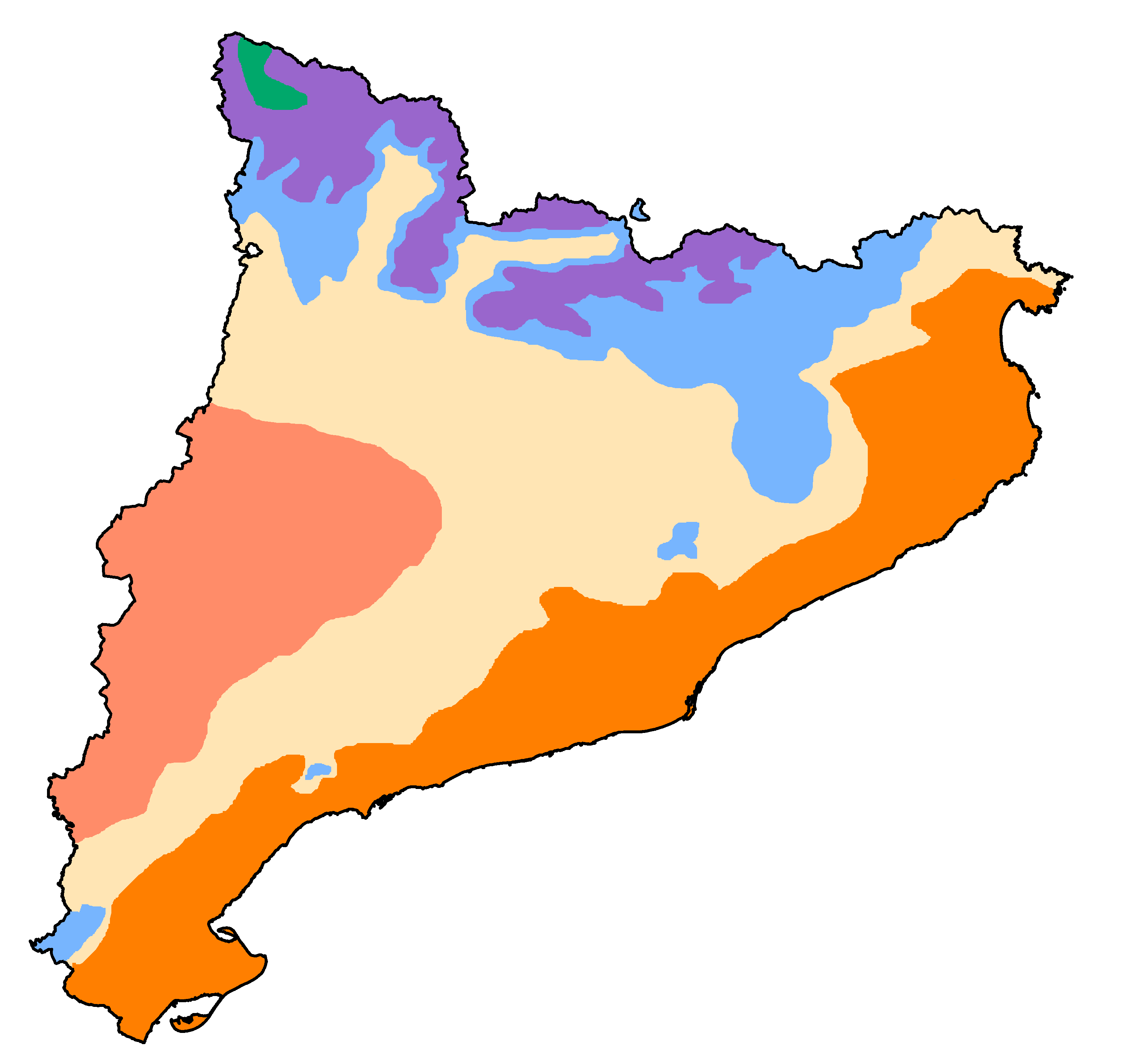 Mapa climàtic de Catalunya.